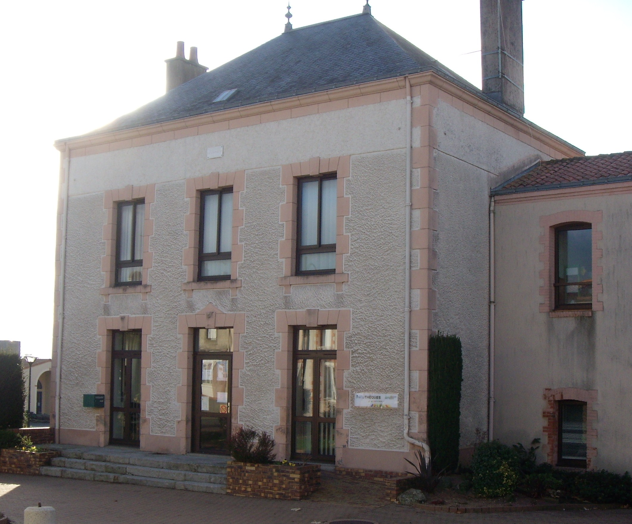 Bibliothèque de Saint-Germain-sur-Moine (Maine-et-Loire, France).